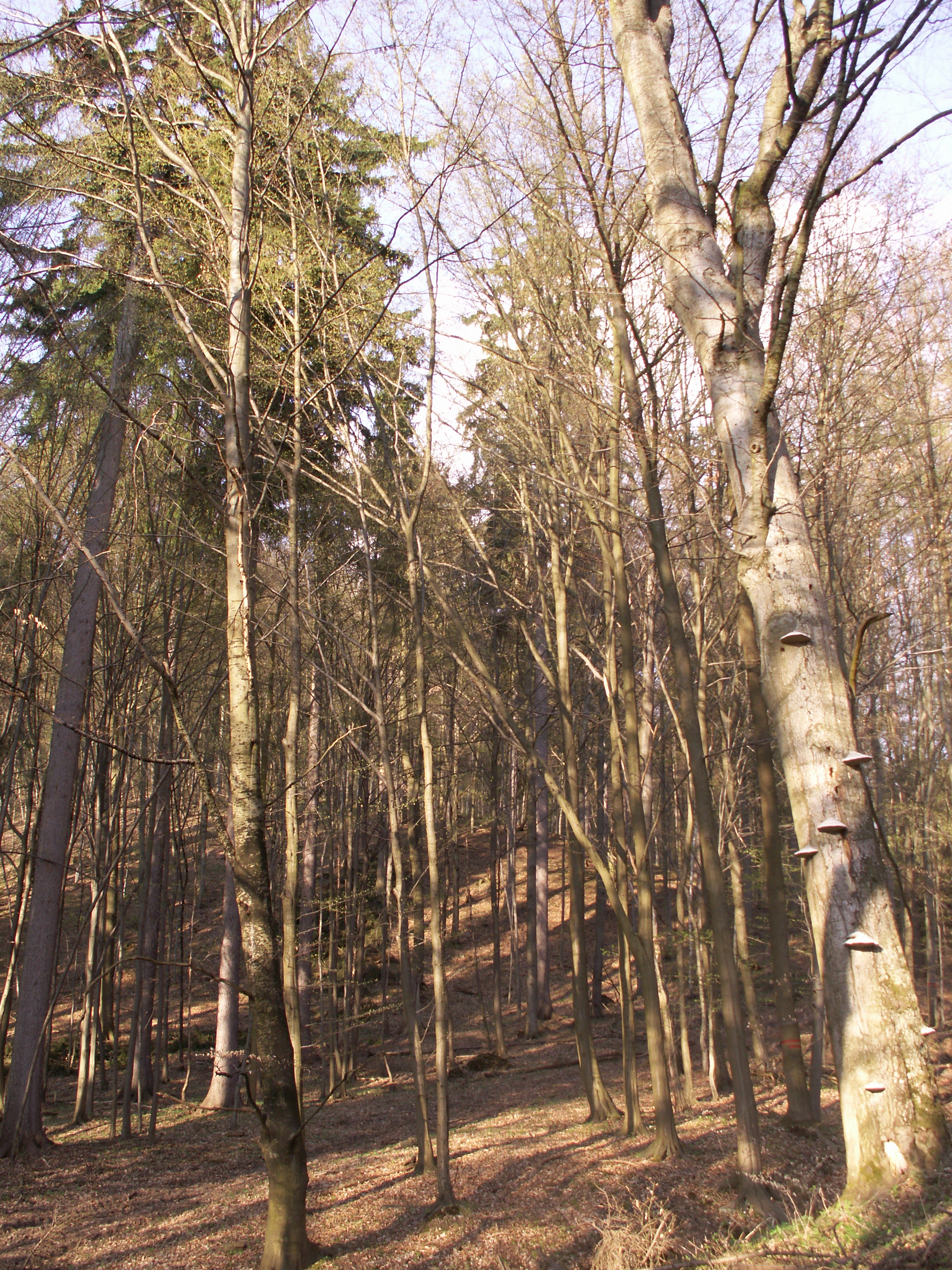 Přírodní rezervace Bayerova, sv. od obce Křtiny, okres Blansko